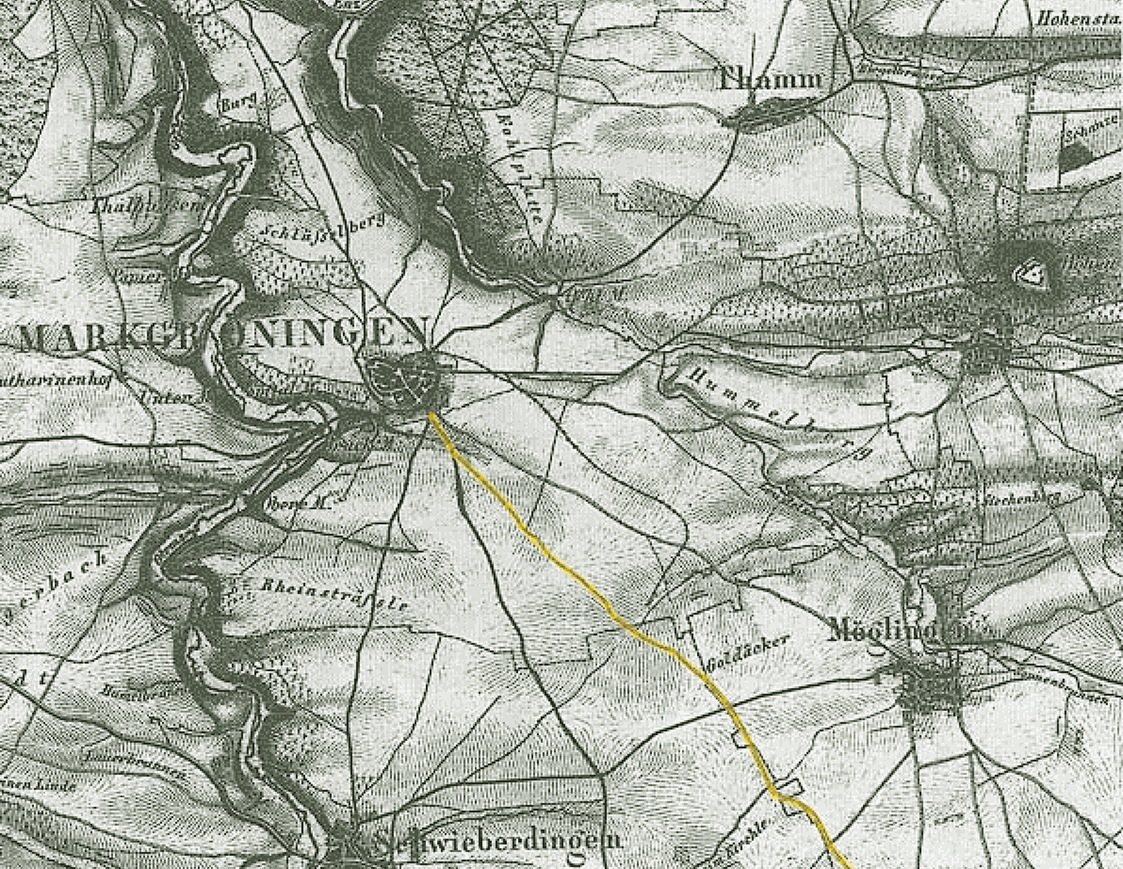 Markgröningen, Straße nach Stuttgart, Topographischer Atlas Württemberg, Blatt 16 (1840)